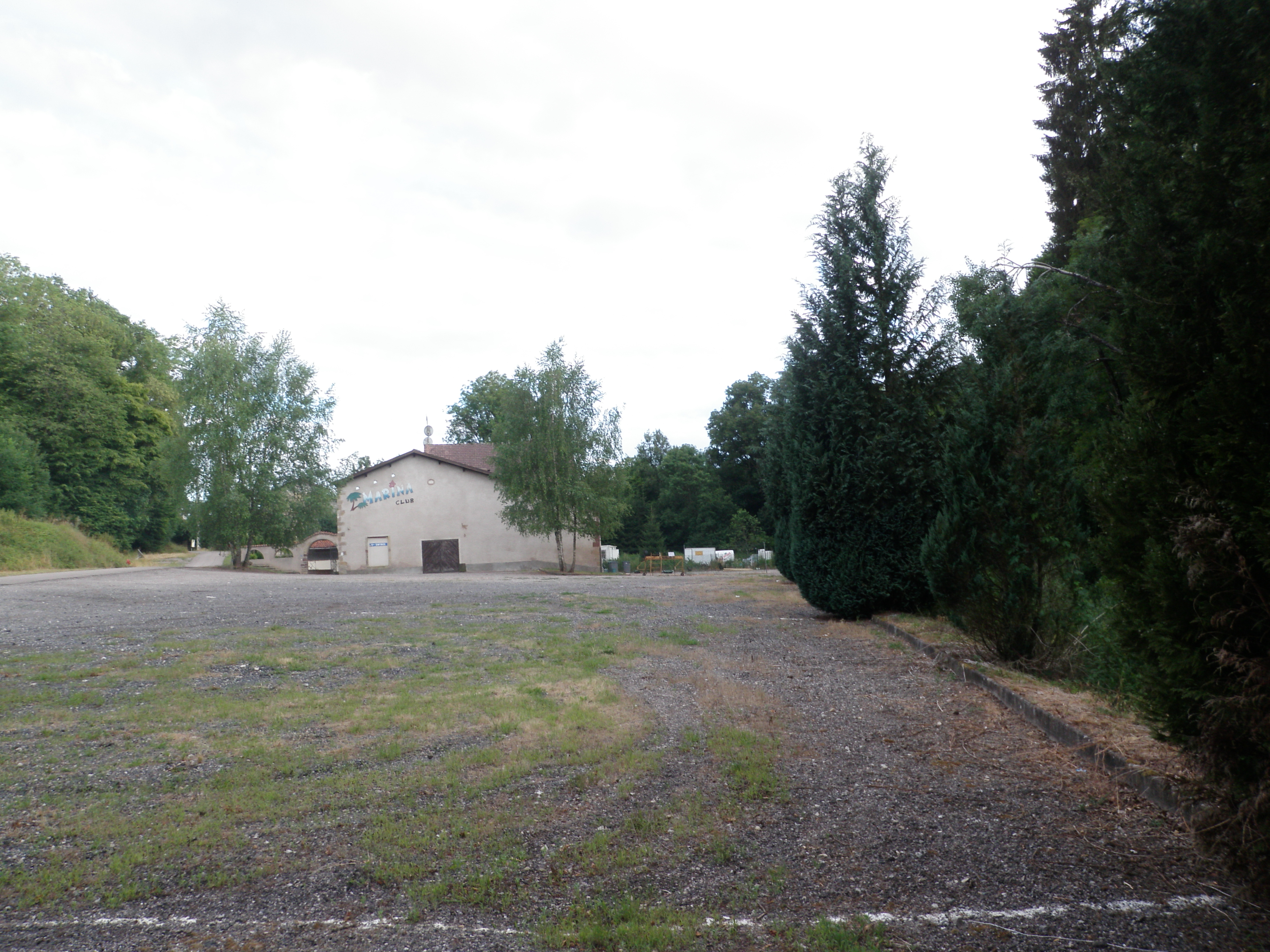 Hameau de Bonfays (commune de Légéville-et-Bonfays dans le département des Vosges)